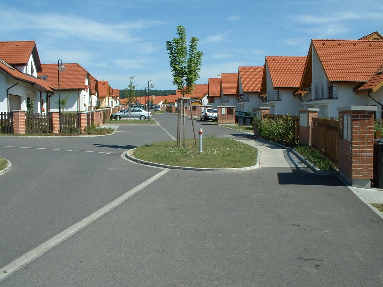 Nové rodinné domky v Levandulové ulici v Plzni-Újezdě